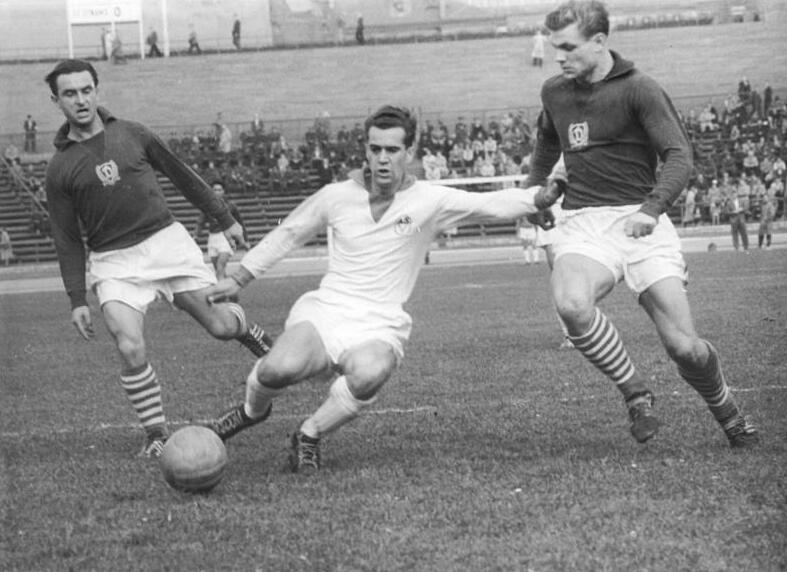 Zentralbild-Wendorf Wen-Qu 18.10.1959 2:1 für den ASK Vorwärts hieß es beim Schlusspfiff des Schiedsrichters gegen den SC Dynamo Berlin am 18.10.1959 im Berliner Walther-Ulbricht-Stadion. UBz. Vorwärts-Spieler Kohle (Mitte) setzt sich hier gegen Schröter (links) und Skaba (beide Dynamo) durch.